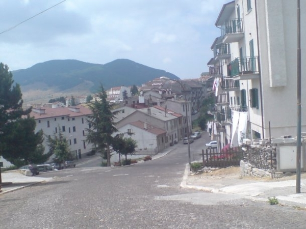 Straße in Capracotta